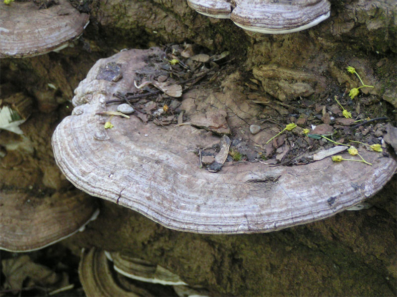 Ganoderma applanatum - Ganodermataceae - Polyporales